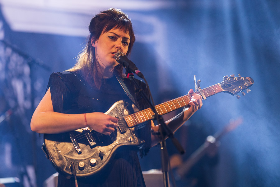 The American singer-songwriter and musician Angel Olsen performing live at Rockefeller, Oslo in 2020.